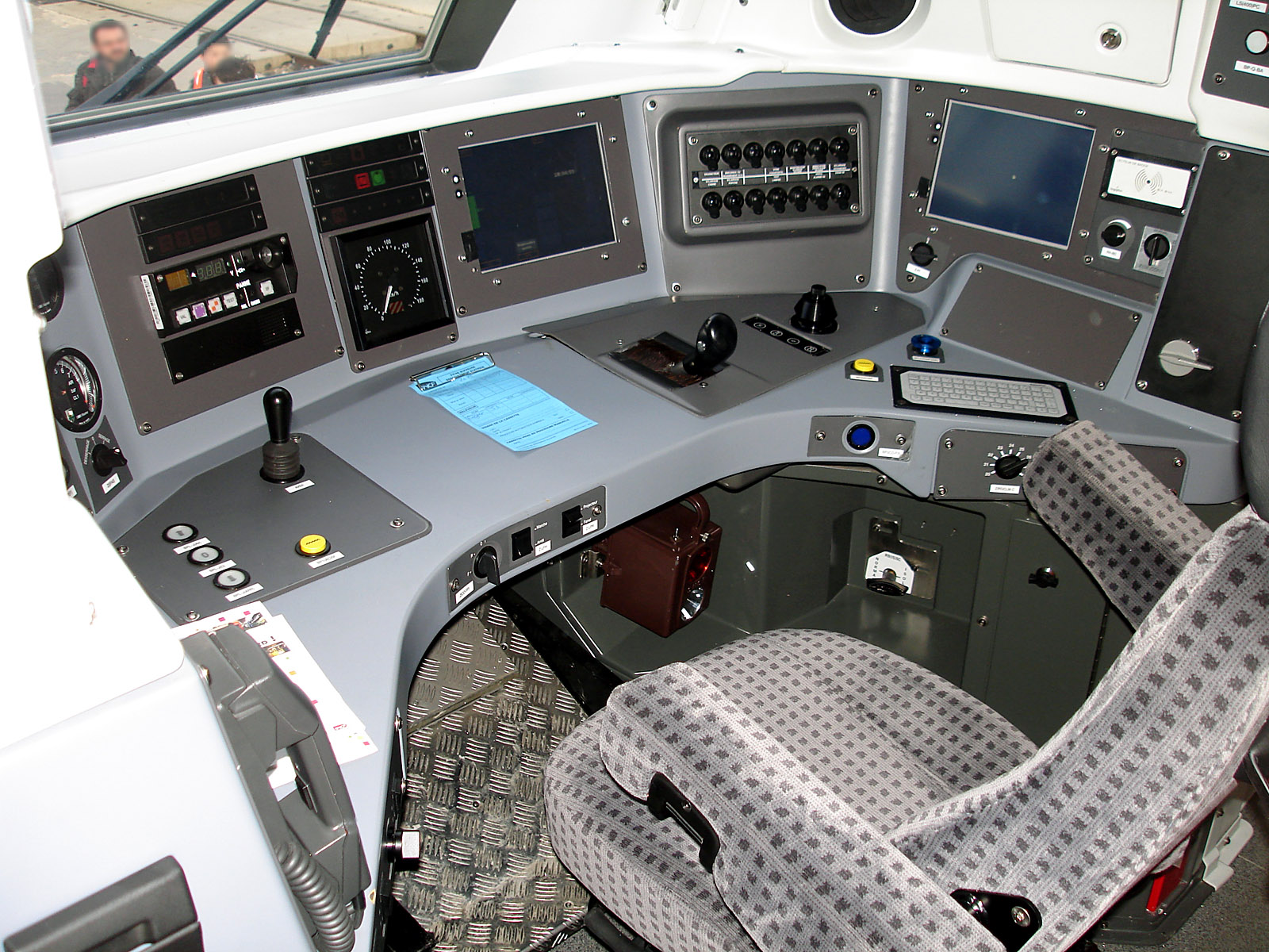 Poste de conduite d'une Z 50000 au technicentre Paris Nord-Joncherolles, Villetaneuse, Seine-Saint-Denis, France.